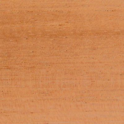 Cedrela (cedrela odorata?) faanyag metszete